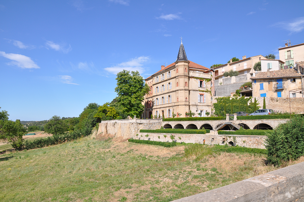 Valensole, le château et son parc